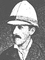 Serge Alpheraky (1850-1918)